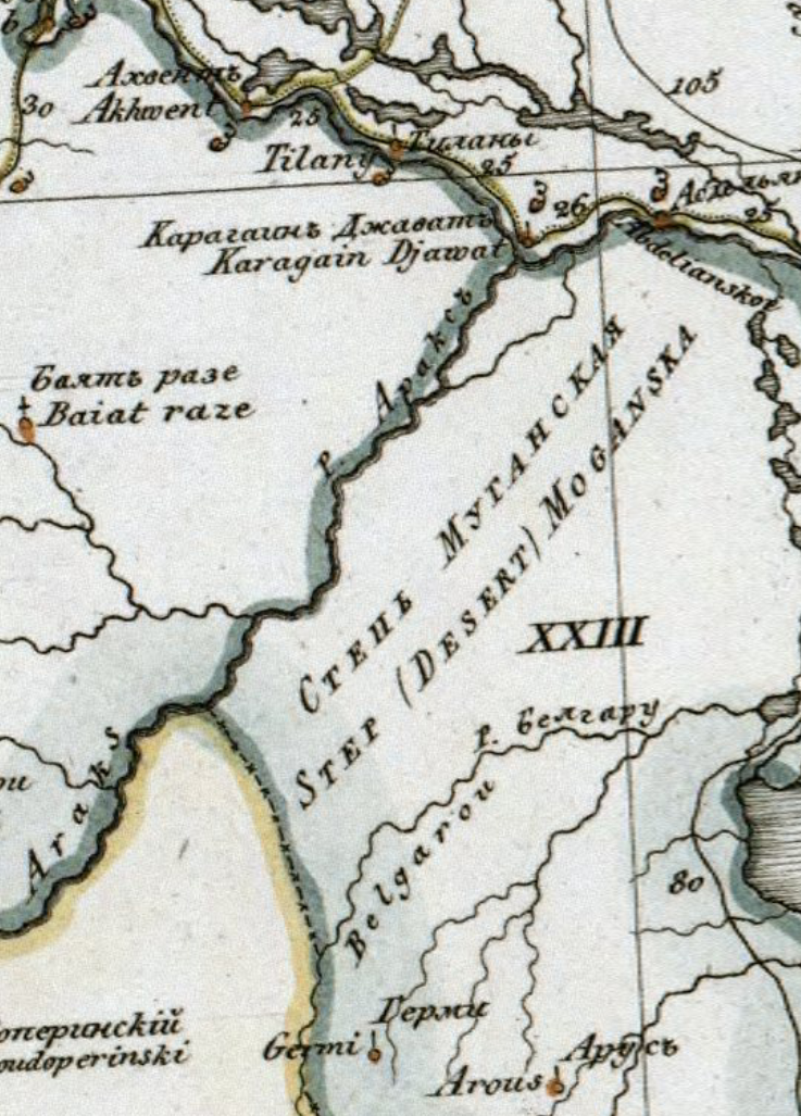 Карта Мугани